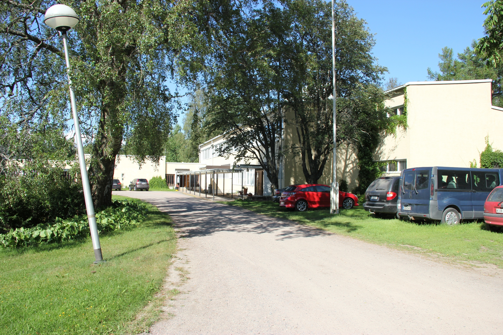 Työtehoseuran Lönnrot-opisto